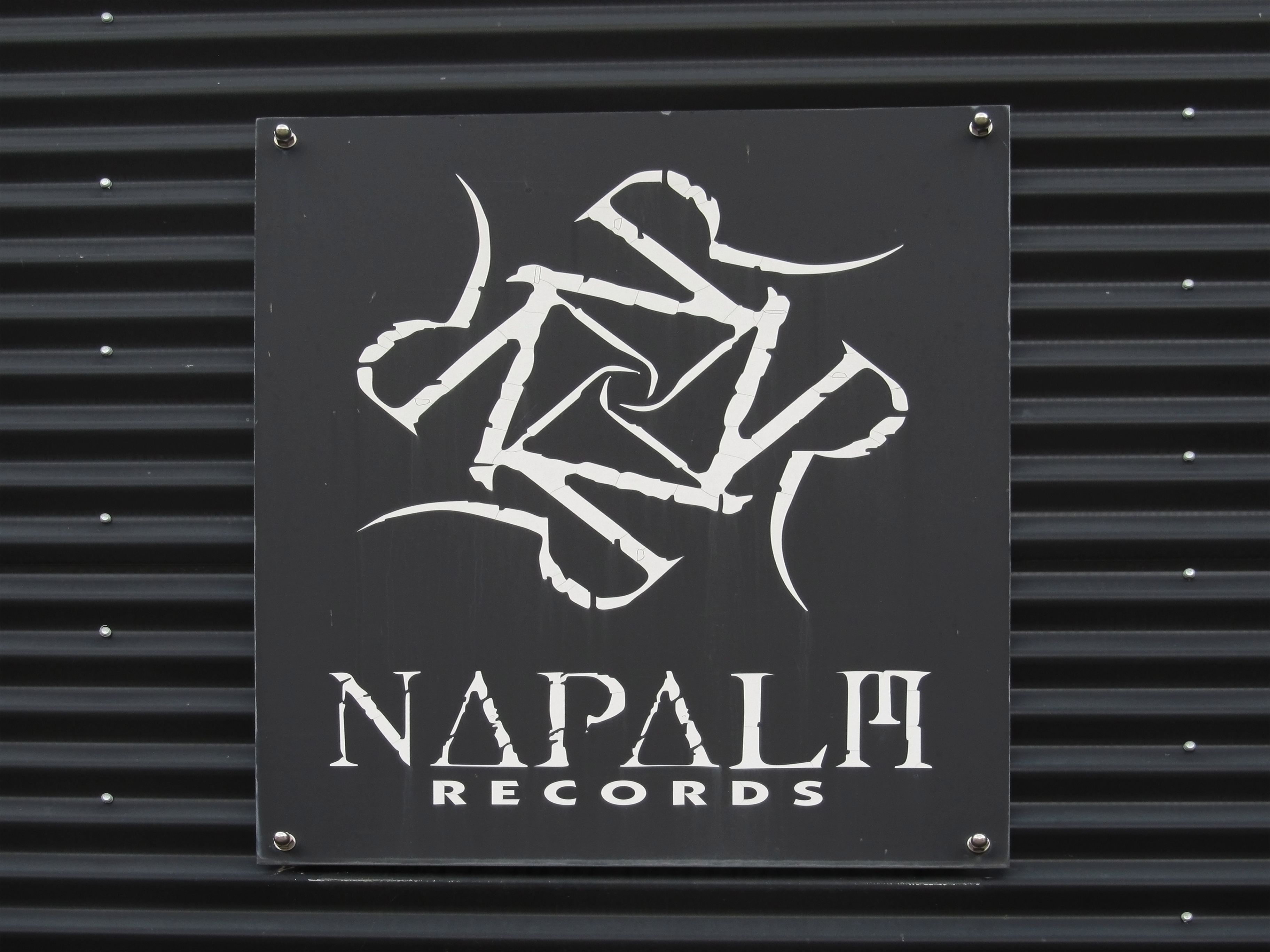 Eisenerz Napalm Records Logo